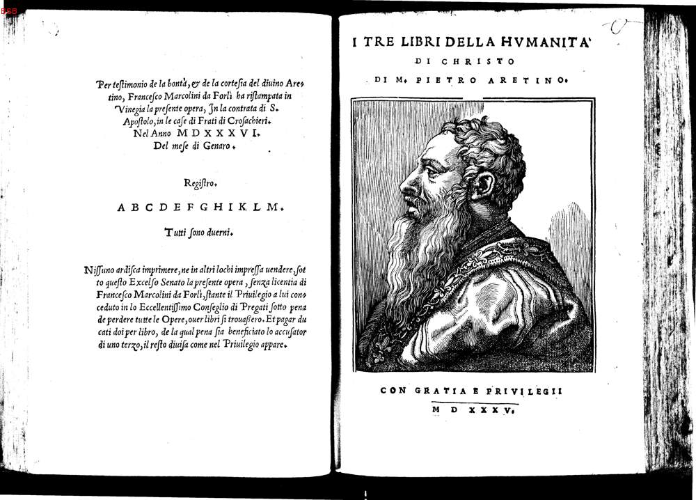 Aretino, Pietro: I tre libri della humanita de Christo, Vinegia, 1535